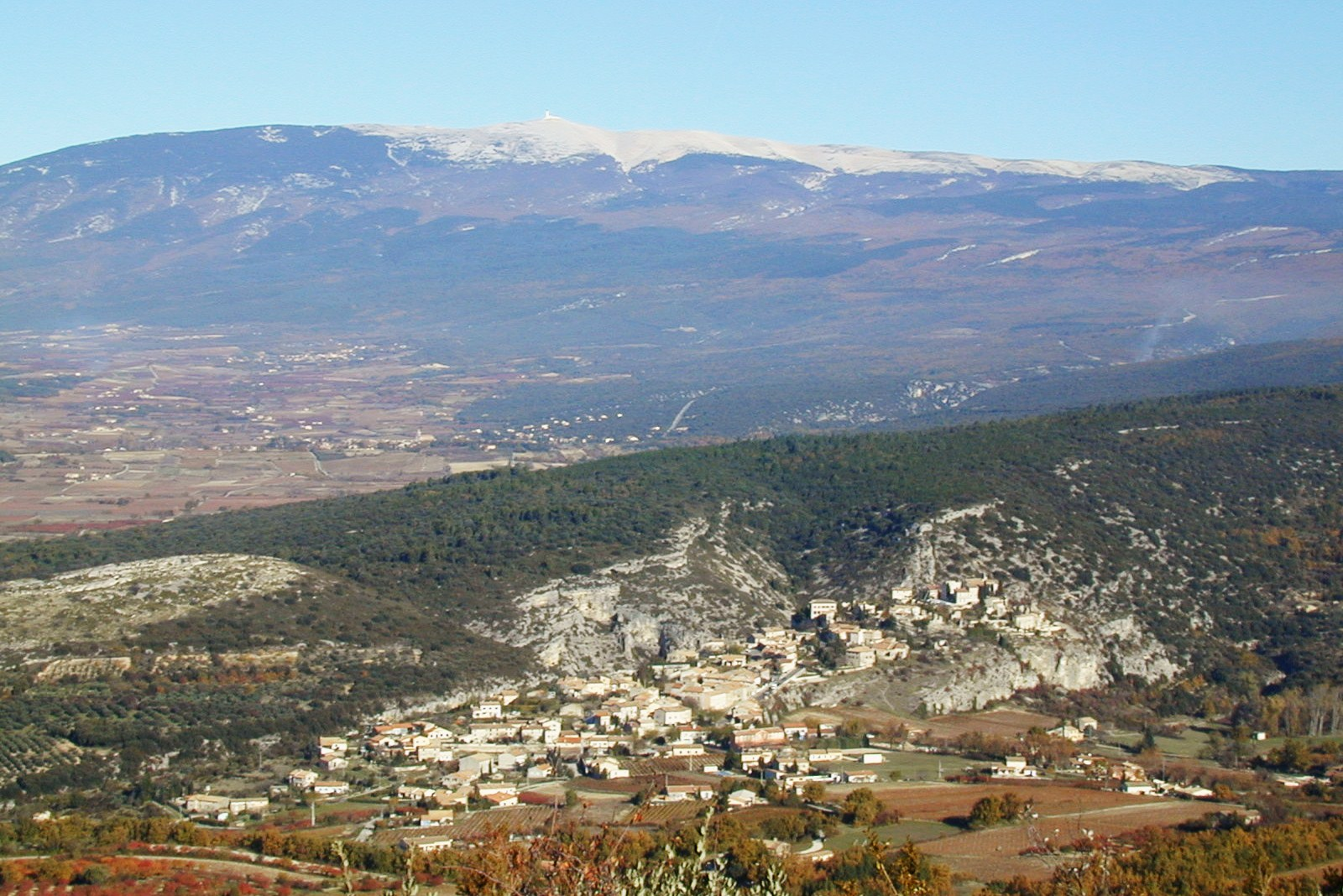 Le mont Ventoux (vu depuis le sud) par dessus le village de Méthamis, France